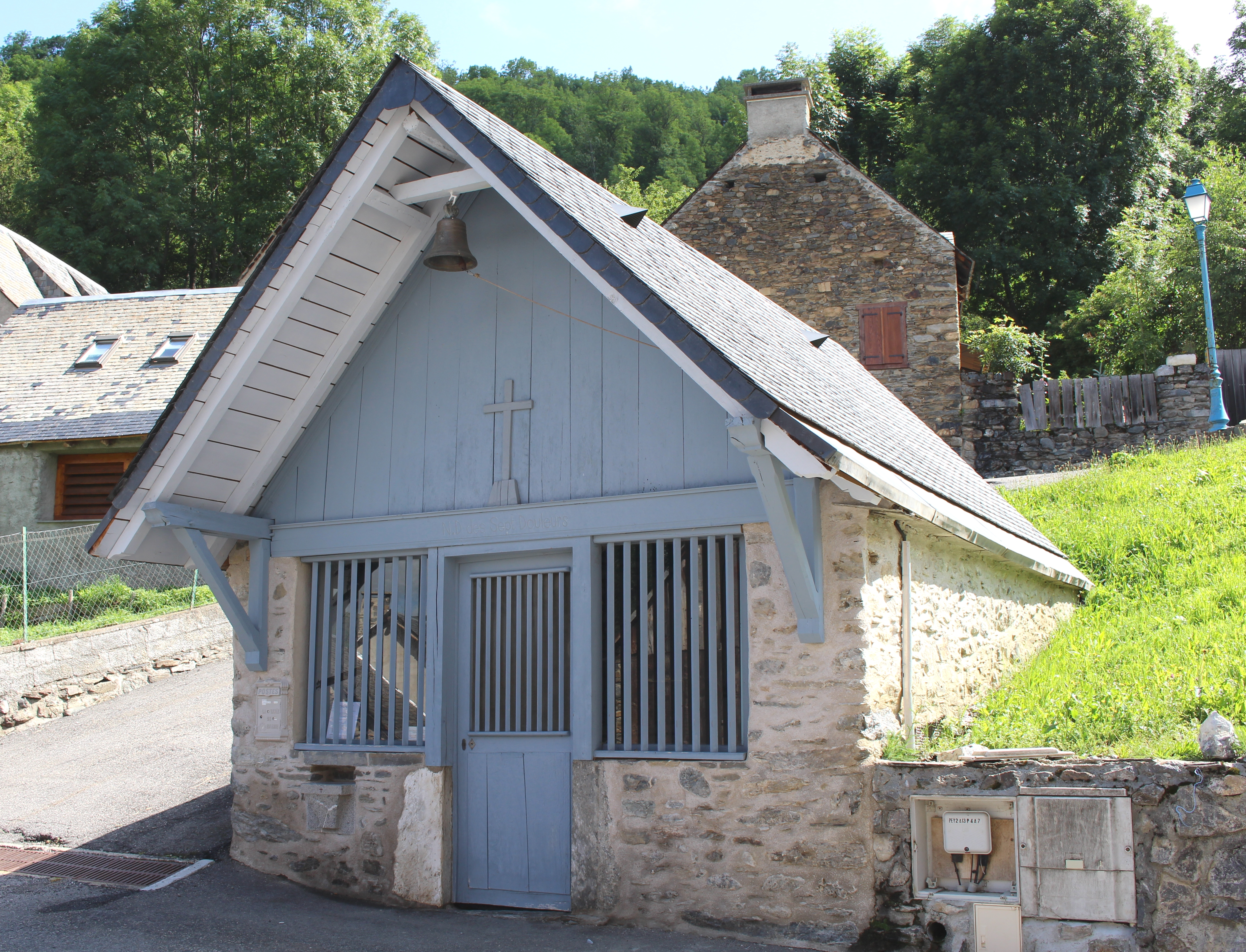 Chapelle Notre-Dame-des-Sept-Douleurs de Germ (Hautes-Pyrénées)